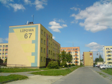 Osiedle lipowa bloki z lat 70-tych XX w.